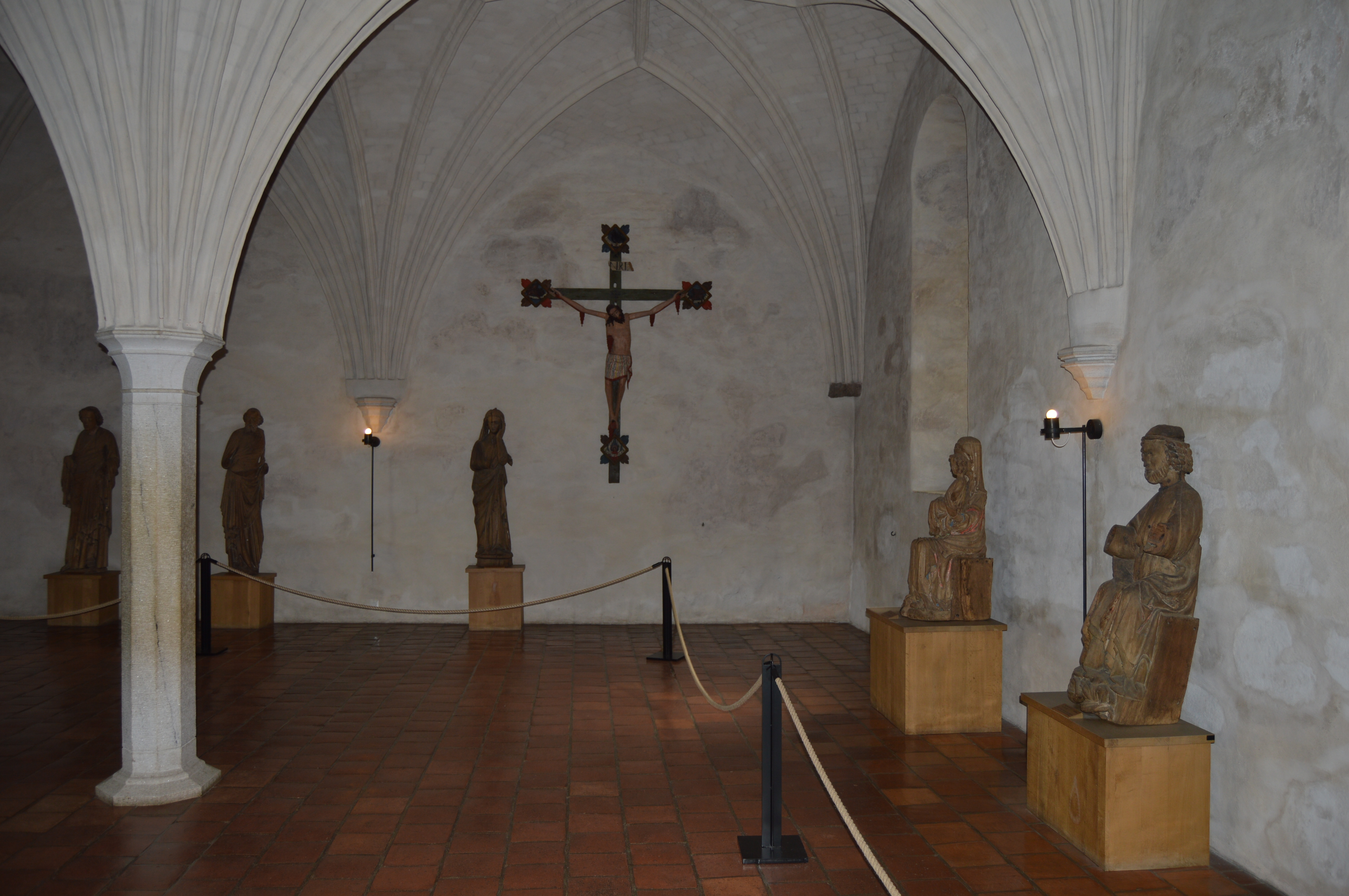 Turun linnan nunnakappeli